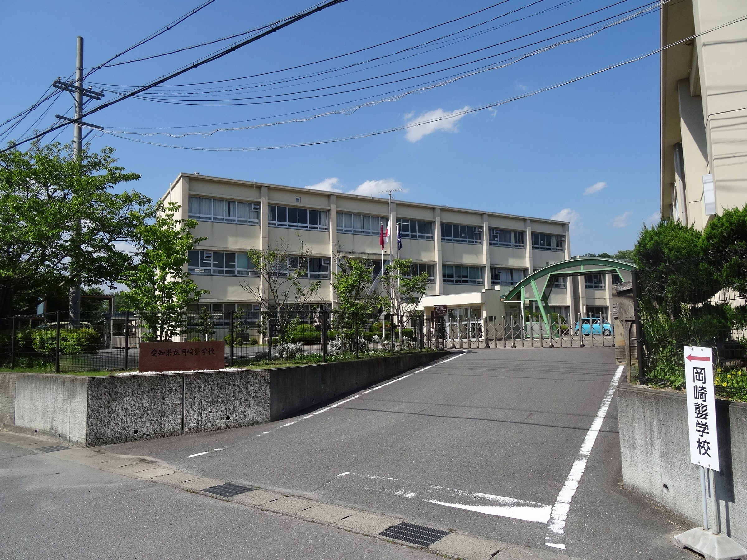 愛知県立岡崎聾学校（岡崎市西阿知和町）